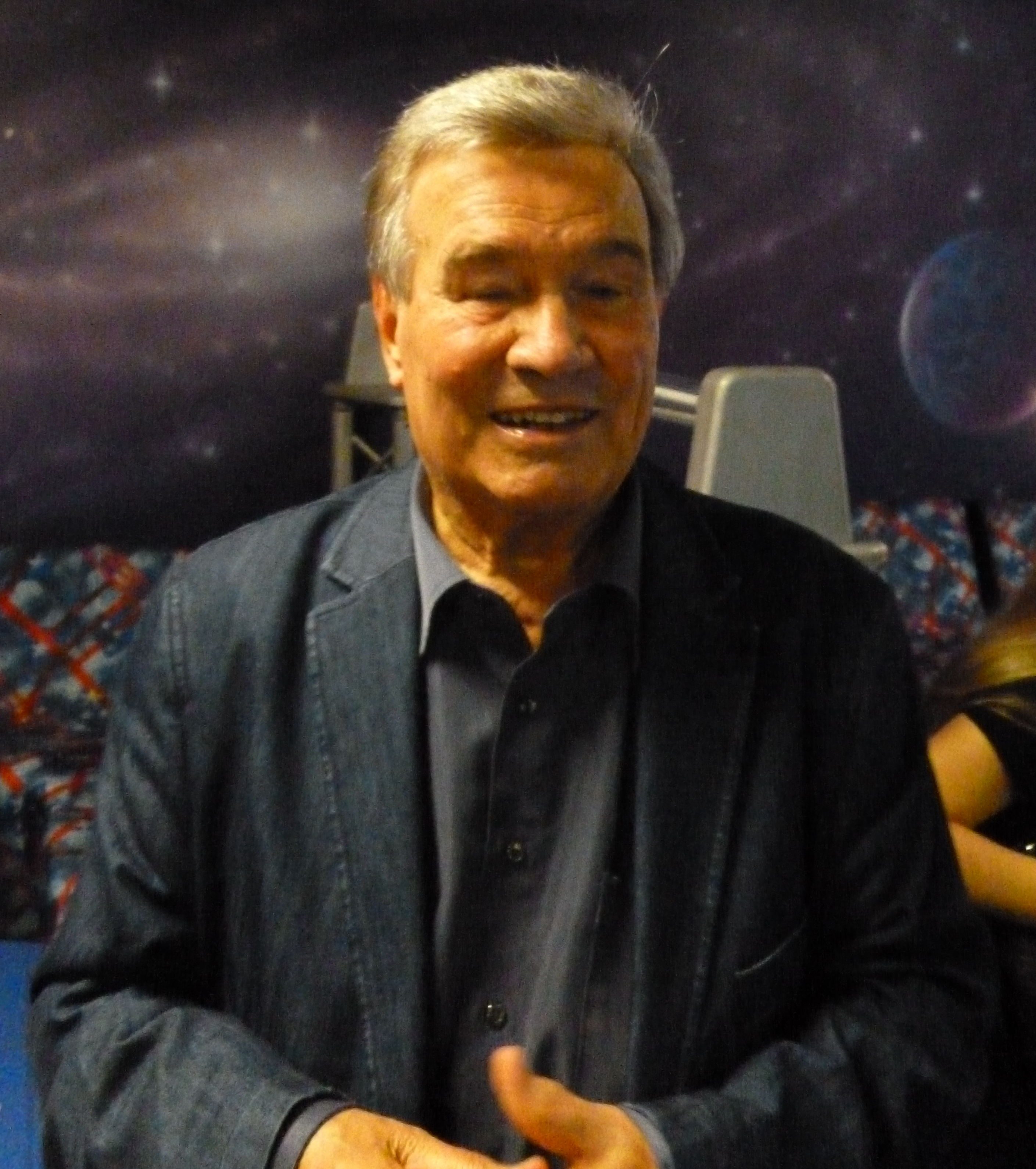 Marcel Azzola lors de l'expo-vente et concerts gratuits organisés par "Nouvel Accord" au Scoopy's à Nozières (Cher) le 13 juin 2015.